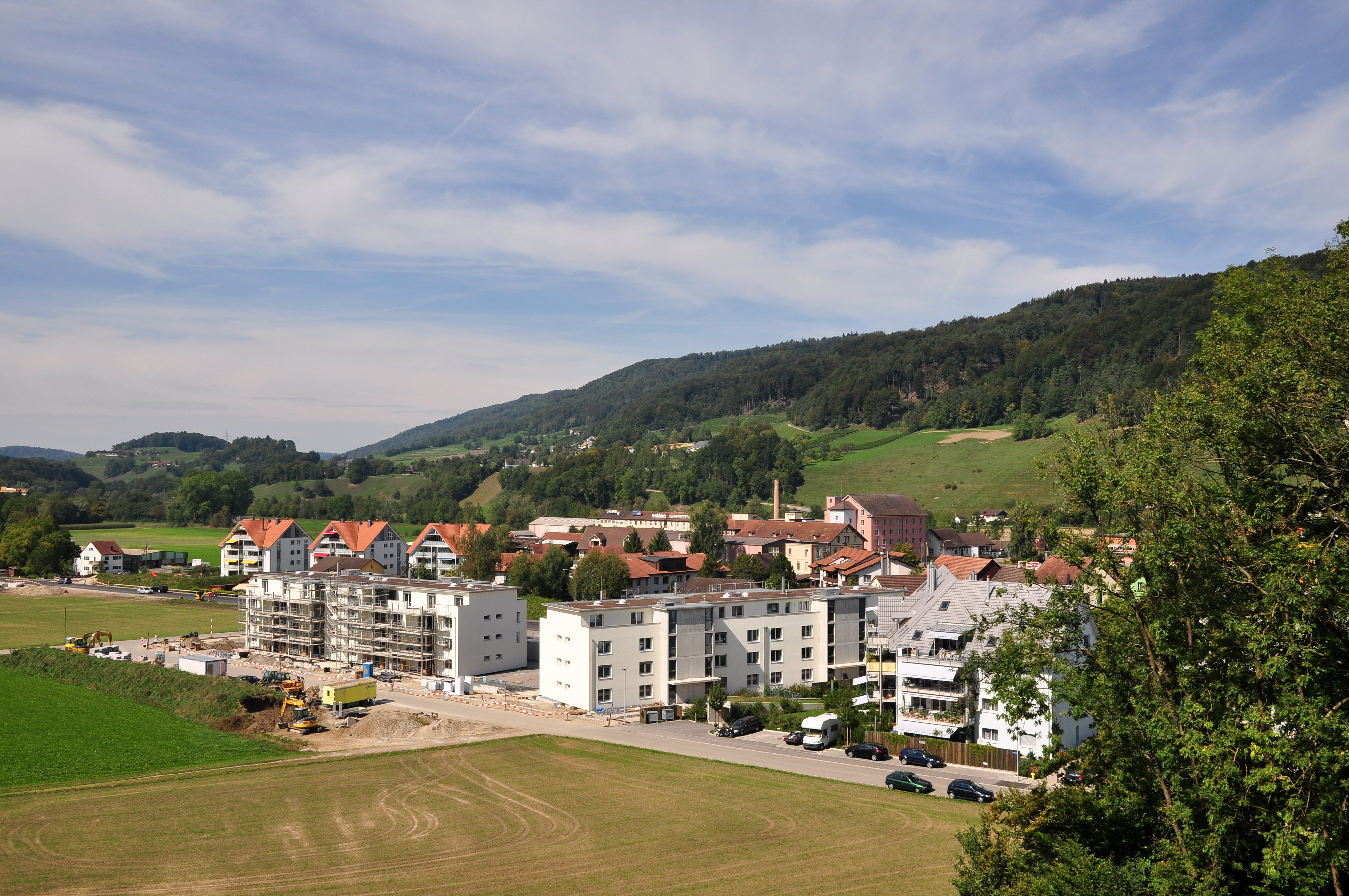 Tösstal in Pfungen (Switzerland)